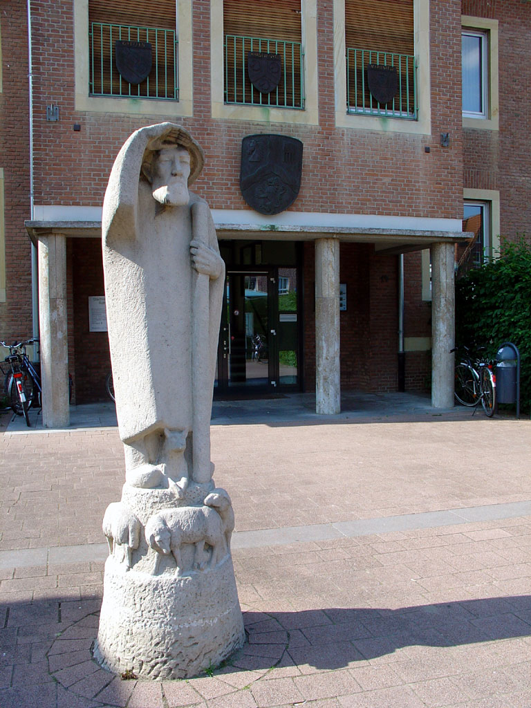 Figur des Spökenkiekers vor dem Harsewinkler Rathaus